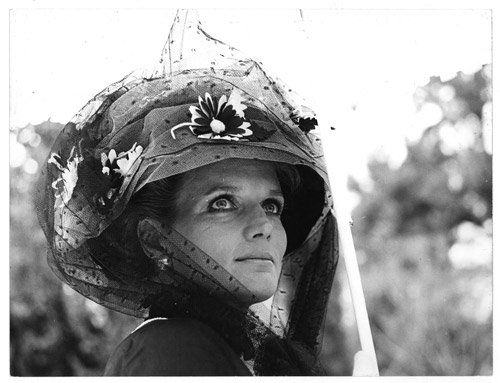 Fotografía blanco y negro, sobre papel fotográfico brillante.Plano corto del rostro de la actriz Chunchuna Villafañe, de tres cuartos de perfil derecho. Usa sombrero con flores en el ala y lazo de "point de sprit".